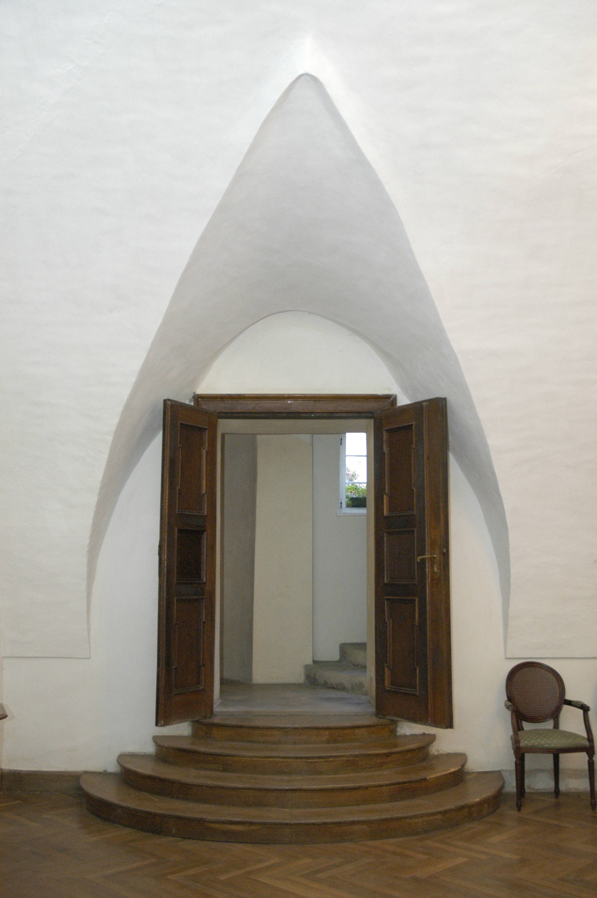 Schloss Schrattenthal Stichkappe im Erdgeschoss